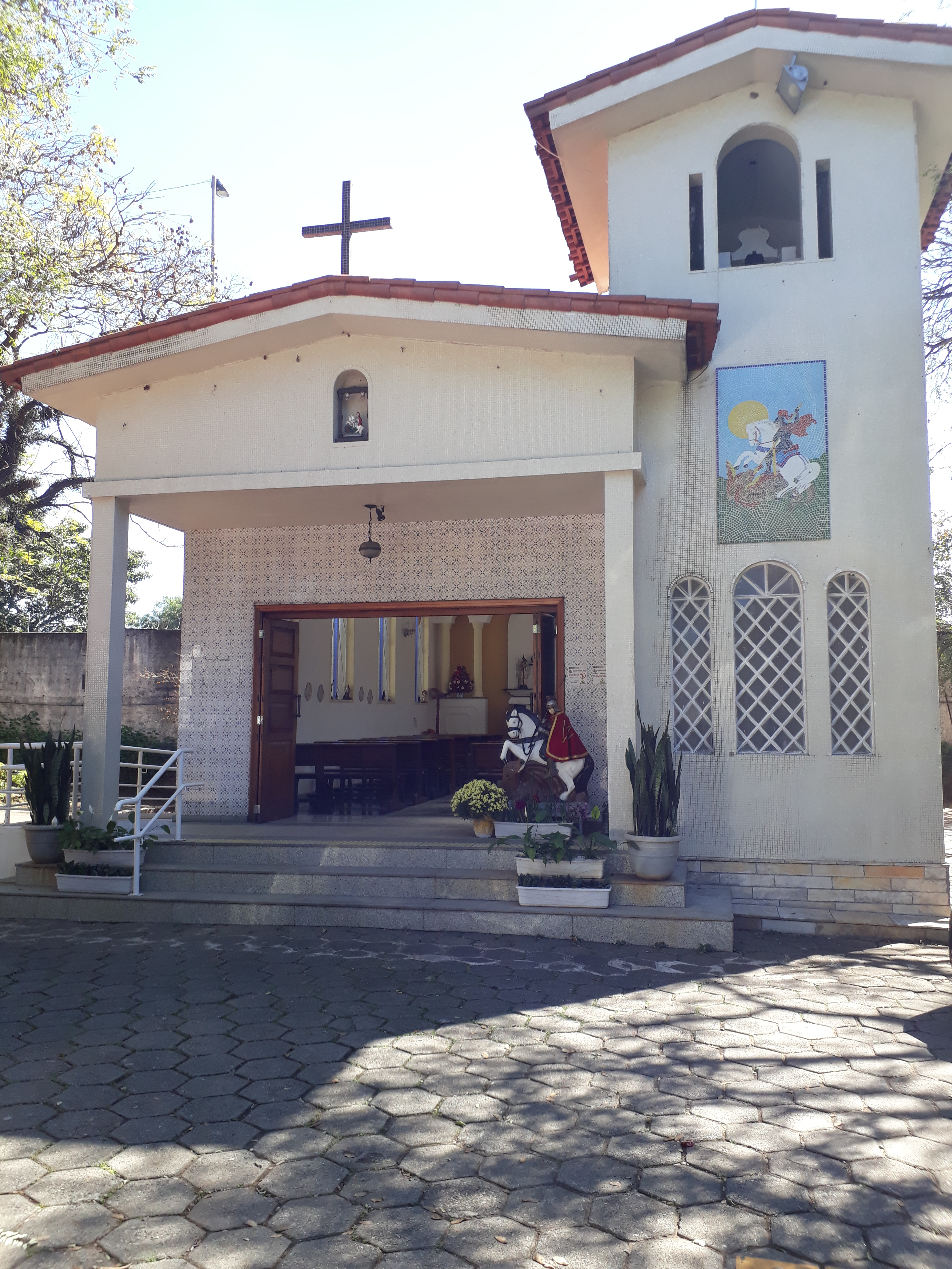 Capela de São Jorge, localizada no Corinthians